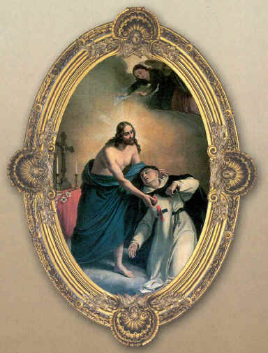 San Miguel de los Santos- San Carlino Roma